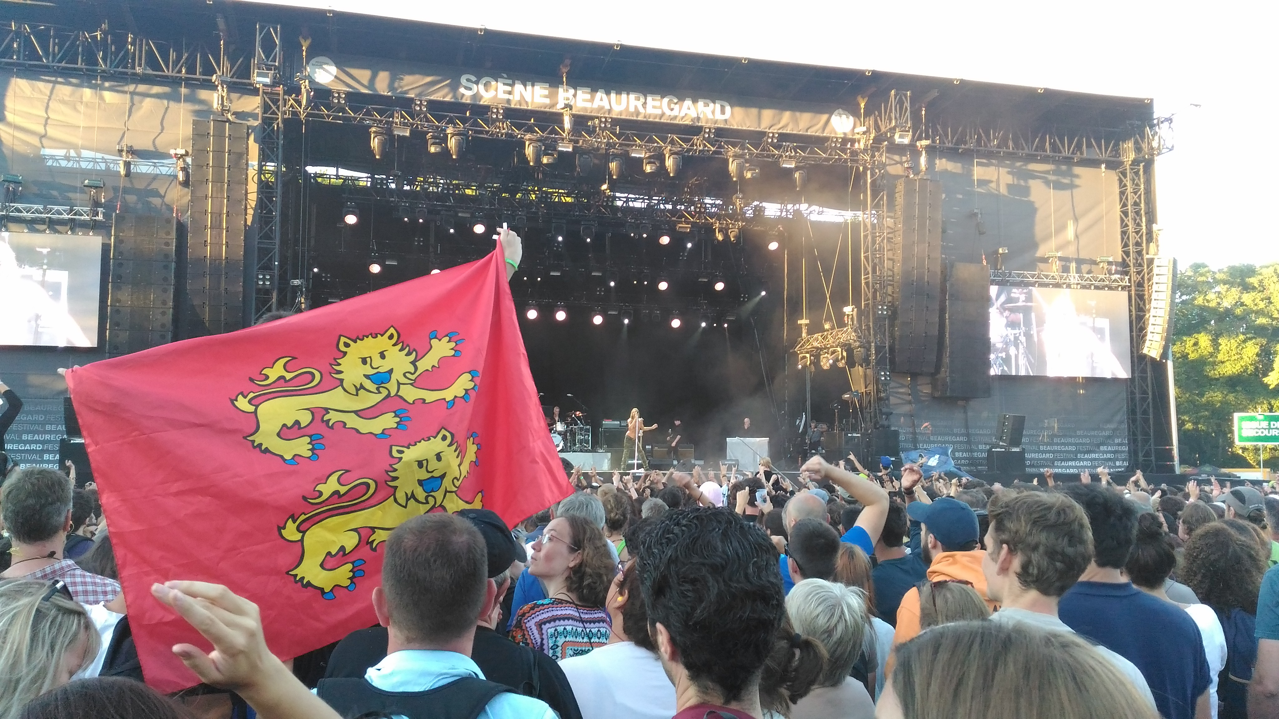 Iggy Pop à Beauregard juillet 2017 (#100wikicommonsdays session 2 jour 5)